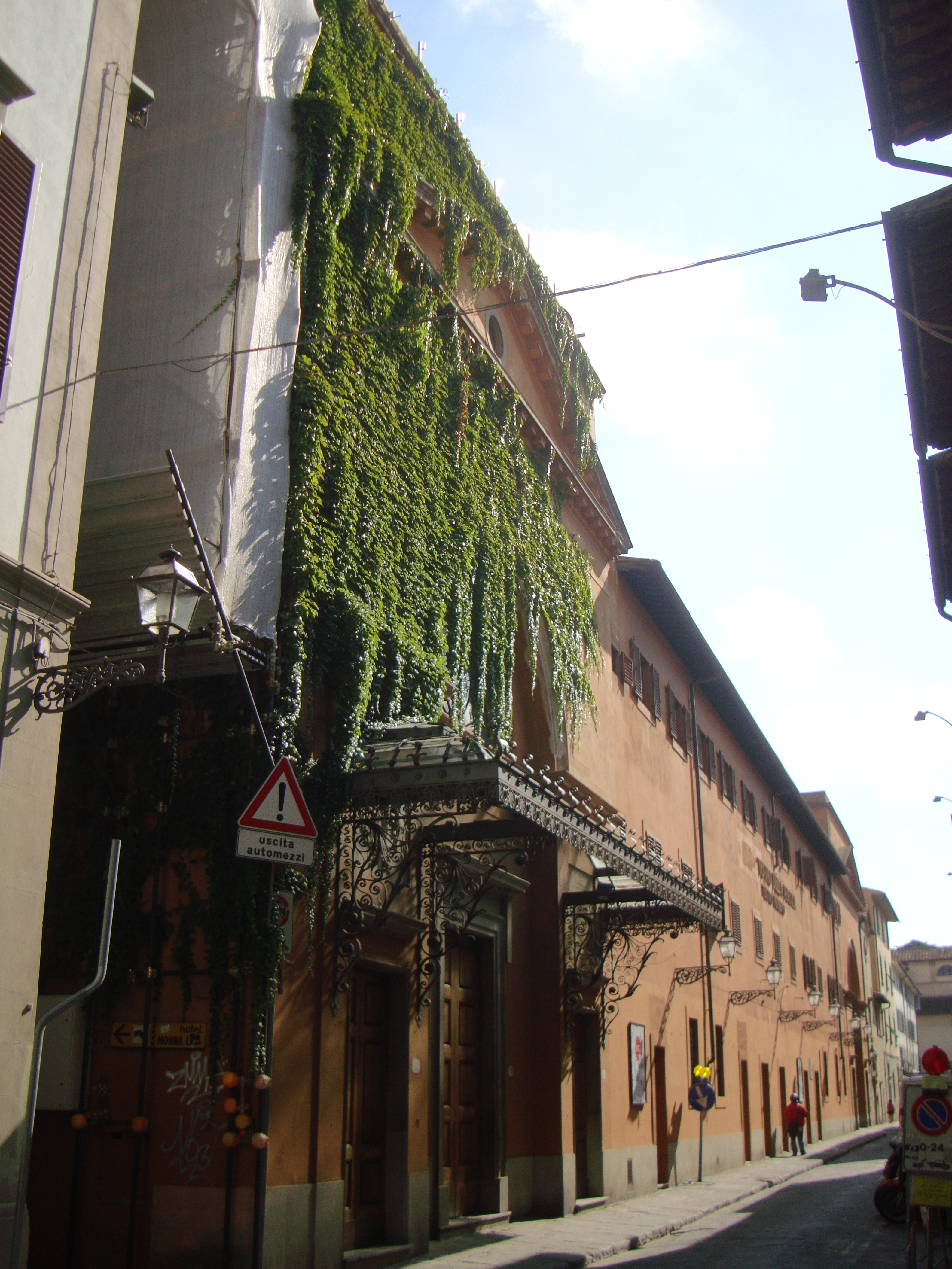 Teatro della Pergola, Firenze 4